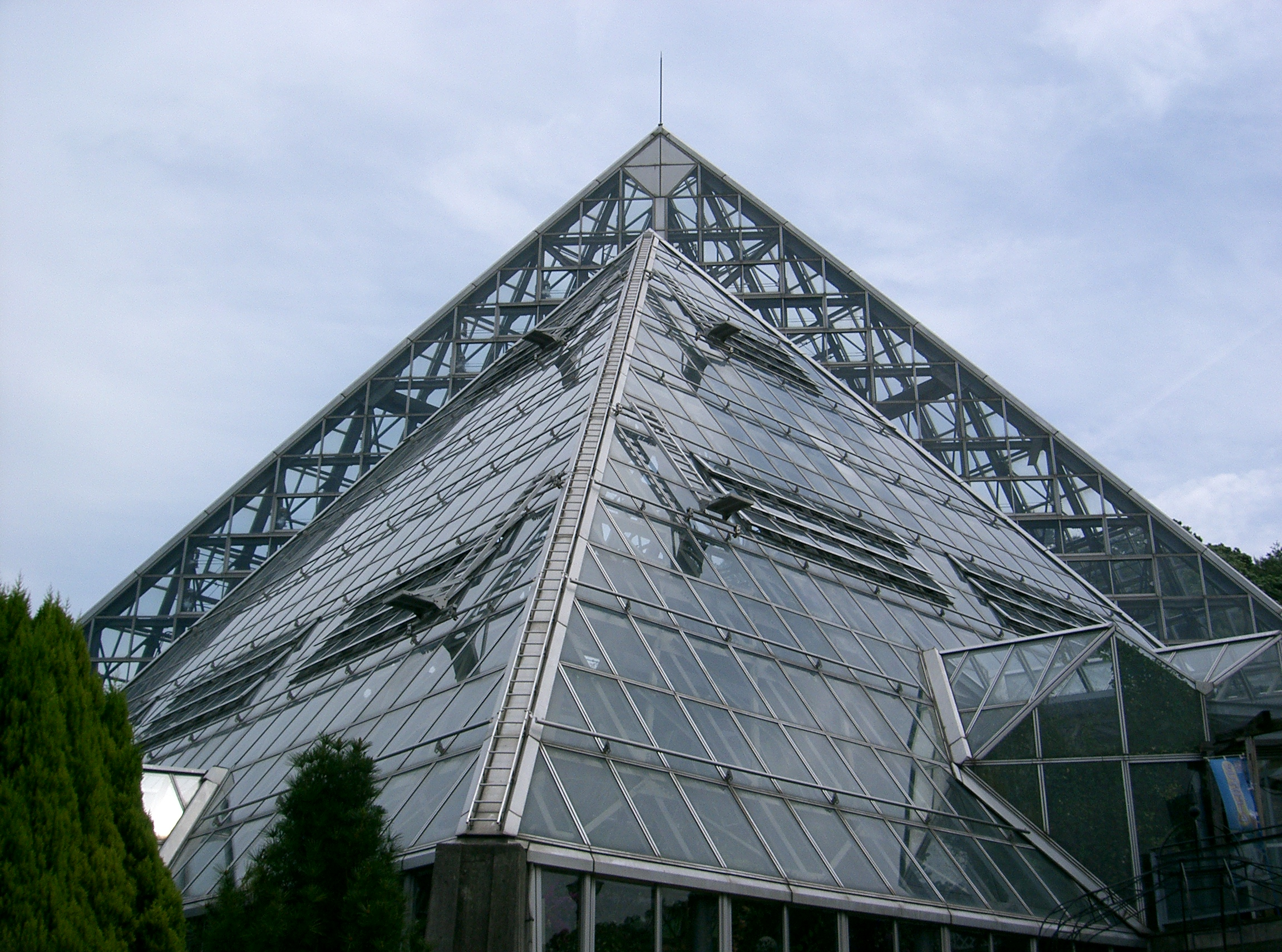 大阪府立花の文化園 大温室